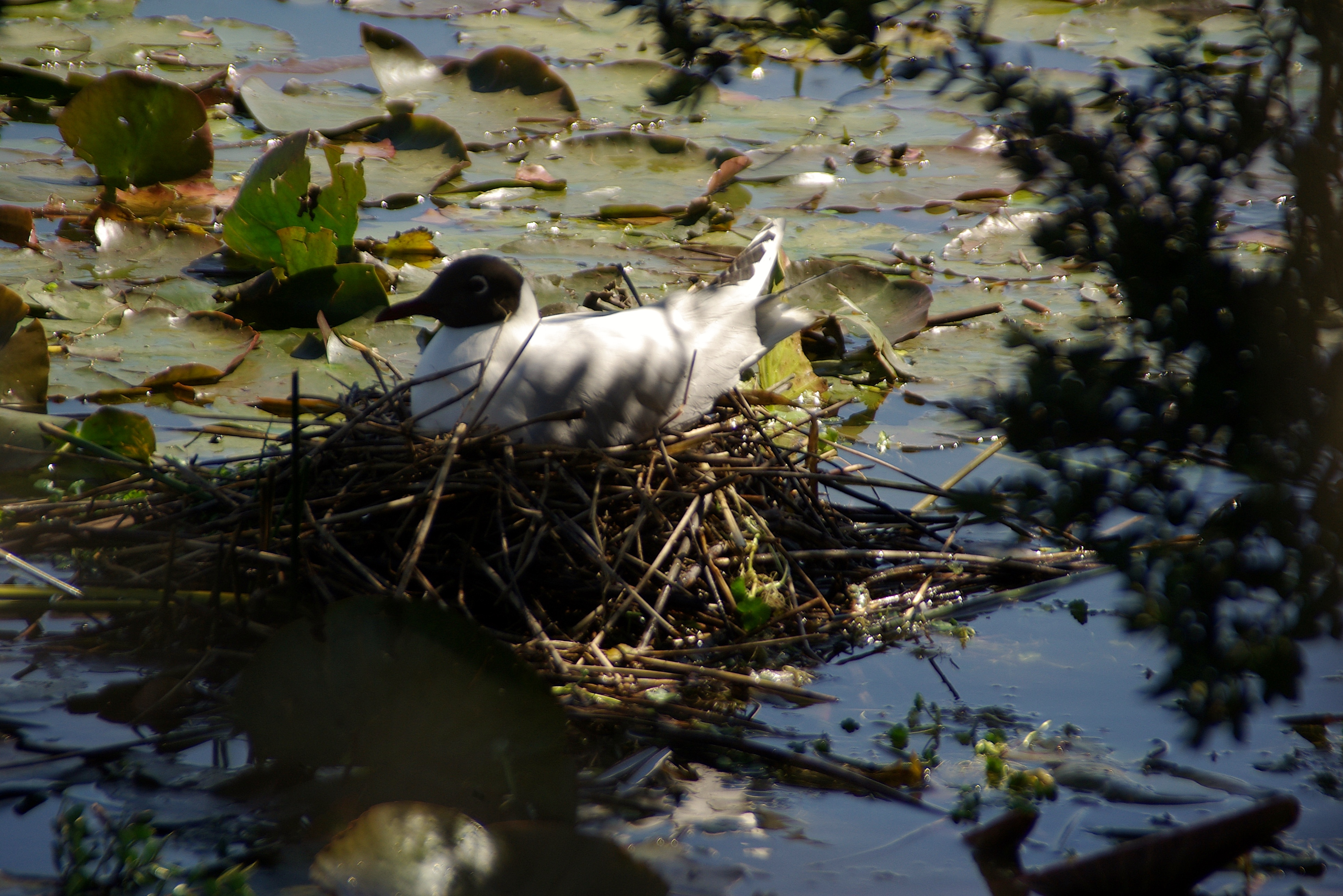 El humedal El Loto en la ciudad de Llanquihue, Chile. El humedal El Loto en la ciudad de Llanquihue, Chile. En la foto, gaviota cáhuil (Chroicocephalus maculipennis en época de reproducción.